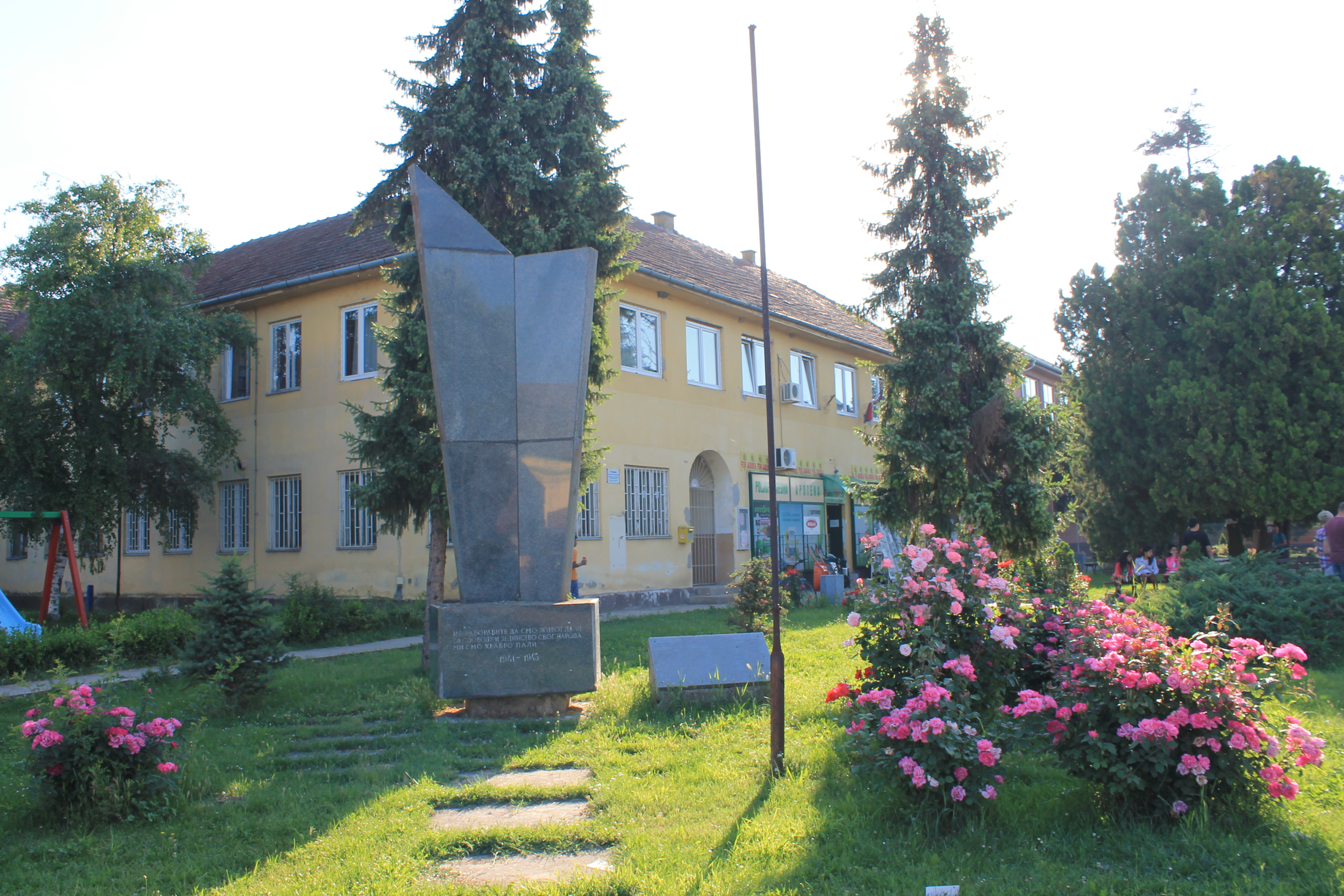 Platičevo